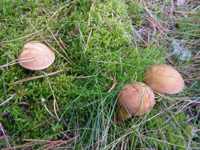 Suillus variegatus